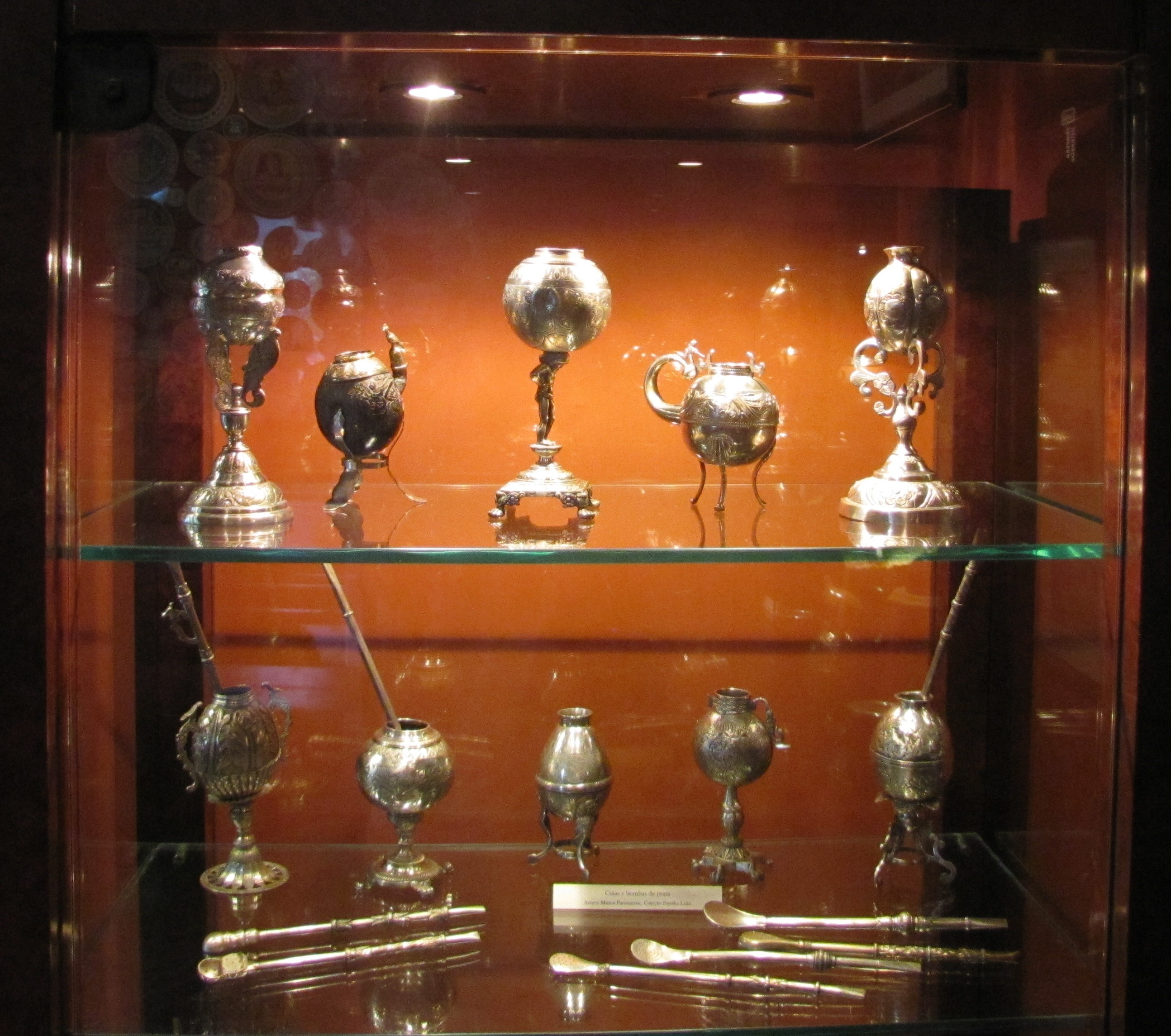 Coleção de cuias em prata, para chimarrão. Acervo do Museu Paranaense, Curitiba, PR.